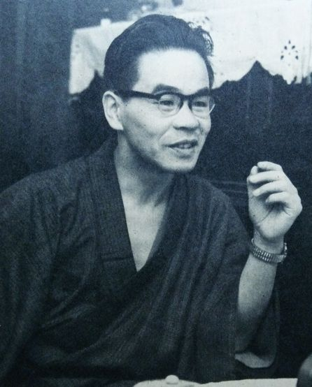 井上友一郎